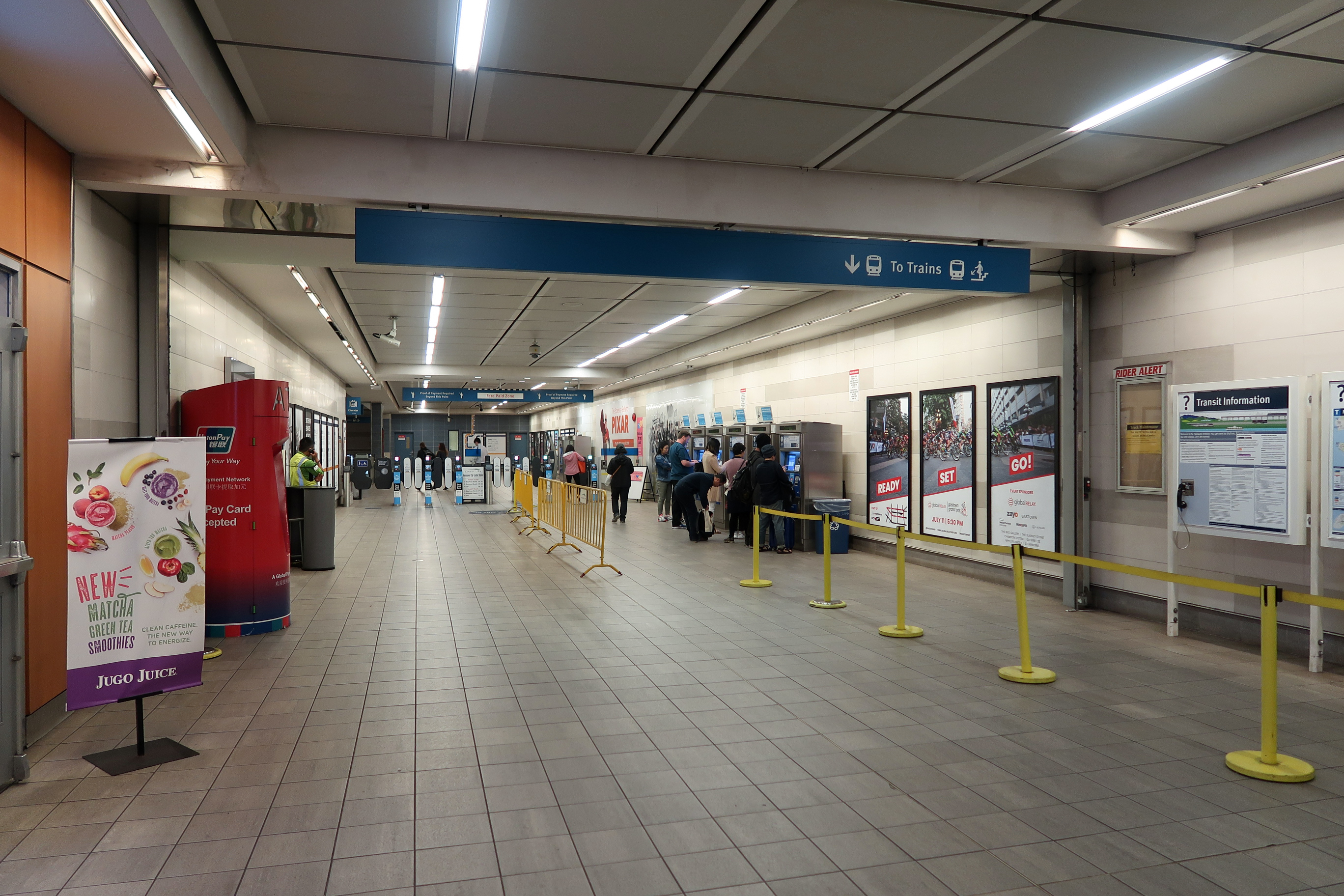 Vancouver City Centre station concourse